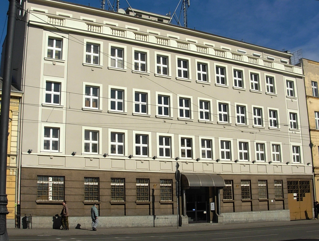 Kamienica ul. Ferdynanda Focha 16 w Bydgoszczy